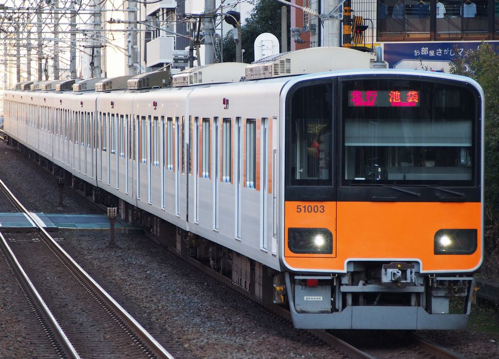 川越駅 Olympus E-PL5